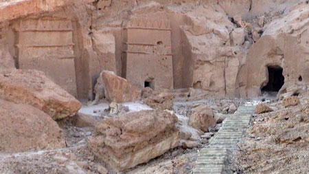 مدائن شعيب